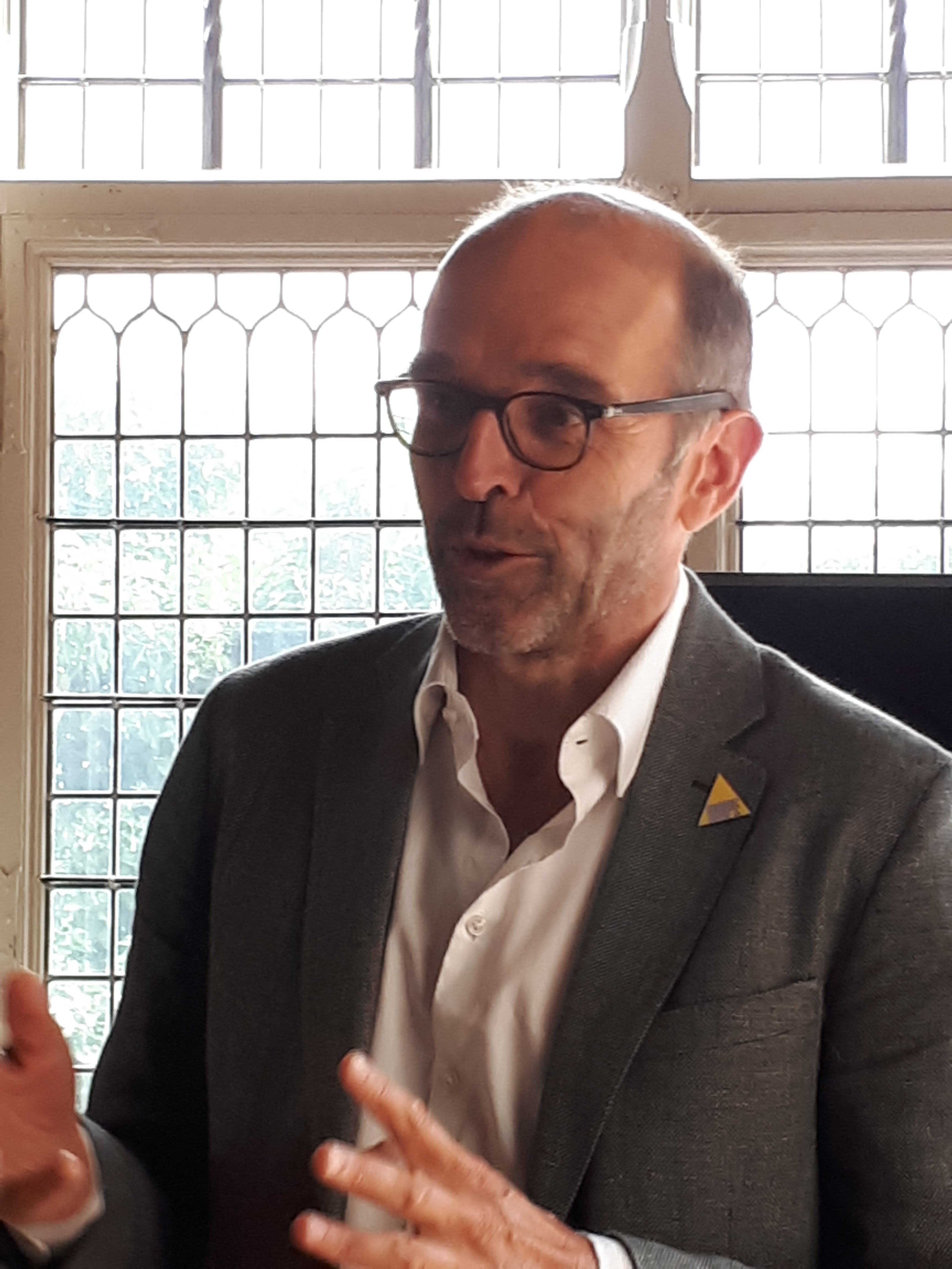 Portret van Maarten Hajer